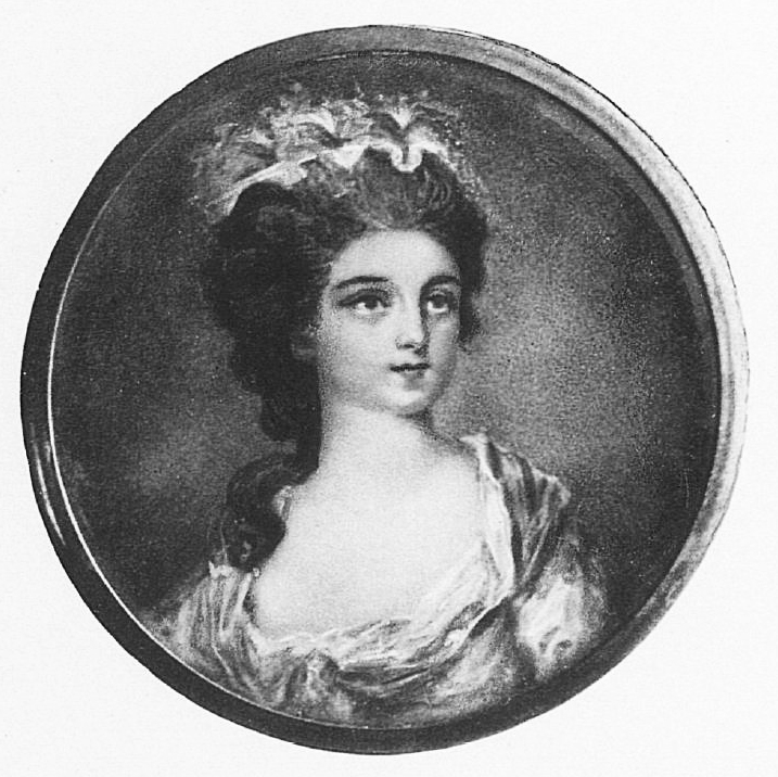 Екатерине Алексеевне демидова, ур. Жеребцовой (1748 — 1810)